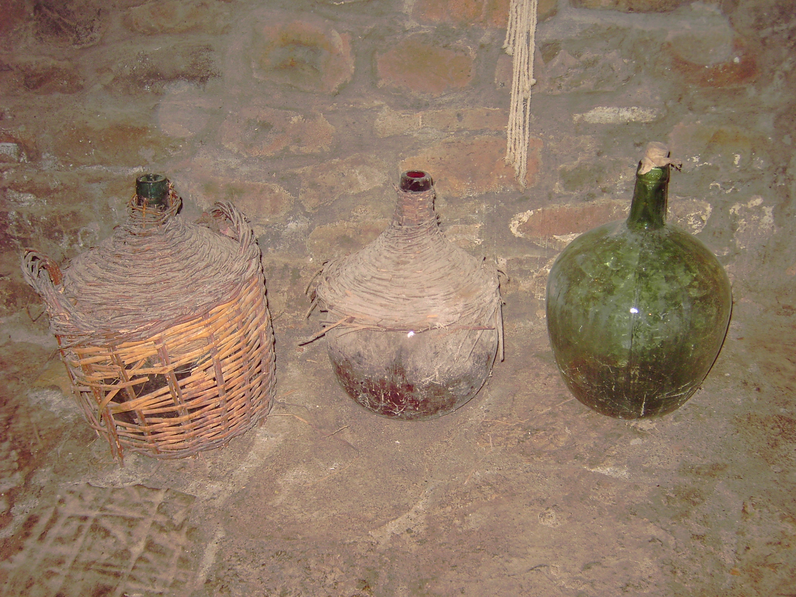 Viejas garrafas de vino en Sobrarbe, Uesca. La primera con su canasta y collera, mientras que la segunda sólo lleva la collera.